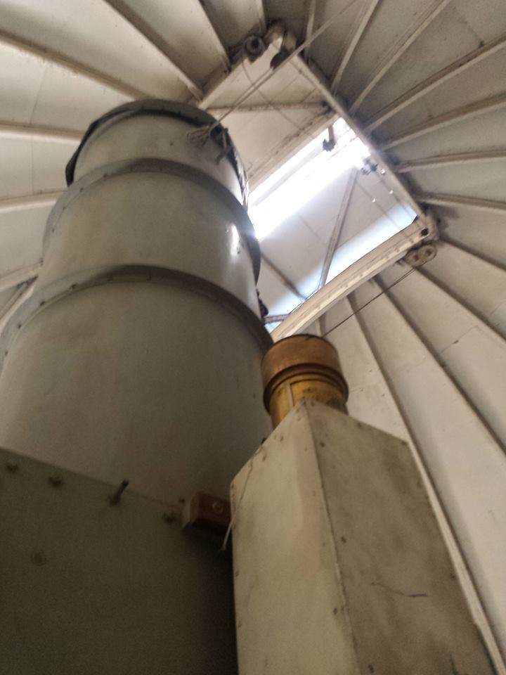 Vista de la parte superior del telescopio al interior del observatorio